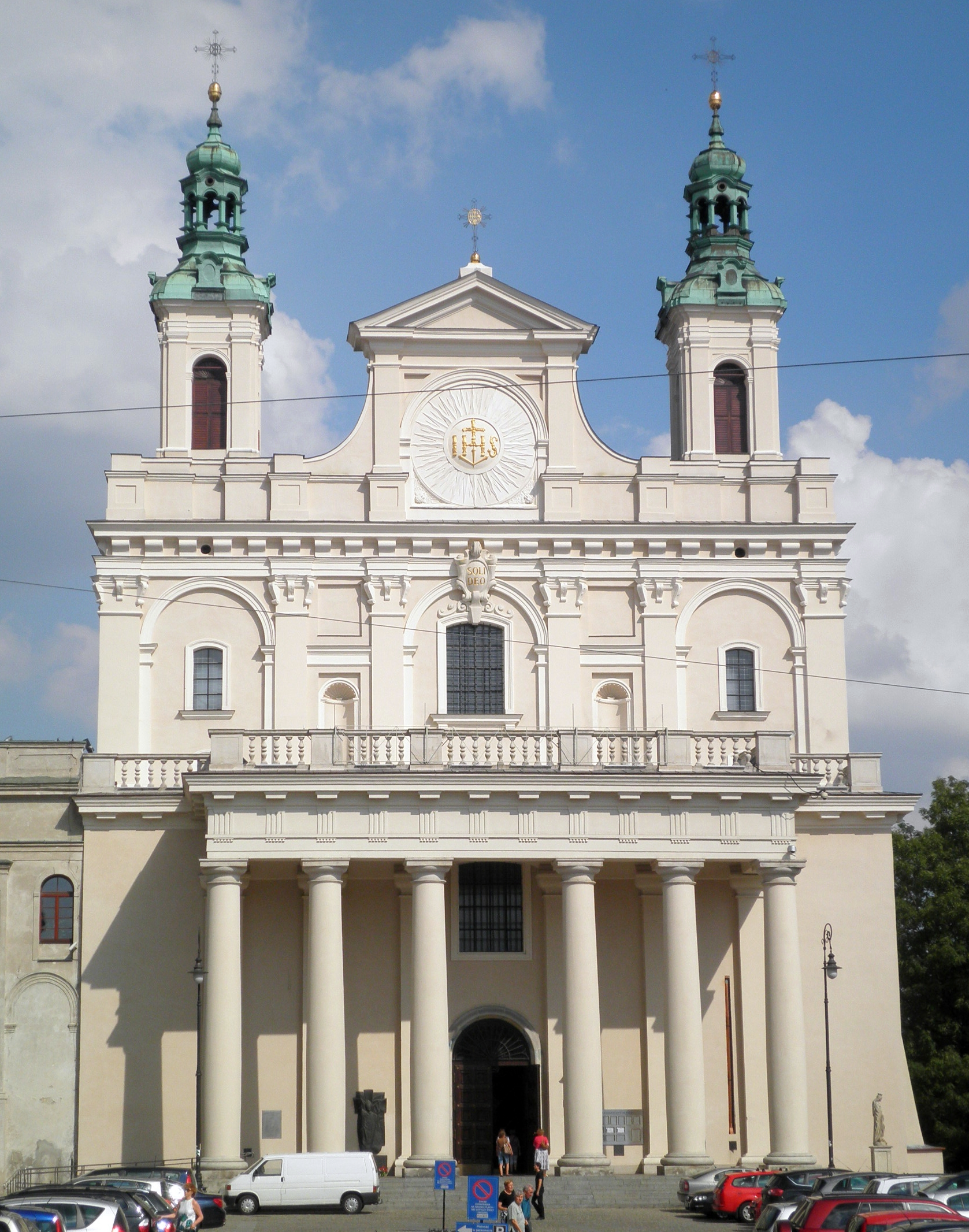 Archikatedra Lubelska - fasada po remoncie